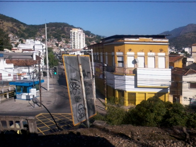 Passagem da Estrada de Ferro Central do Brasil, margeando a rua 24 de Maio, no bairro do Engenho Novo, Rio de Janeiro.